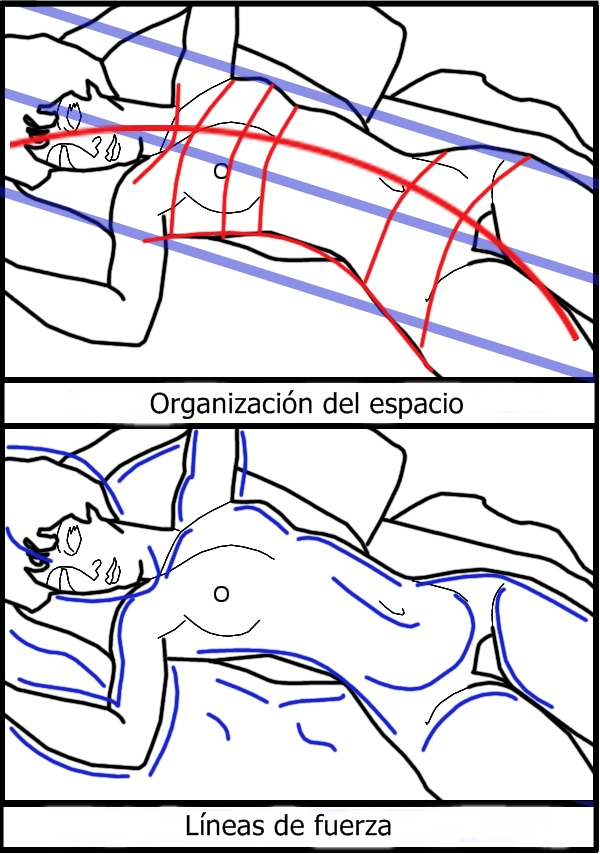 Esquema de líneas en Desnudo acostado de Modigliani